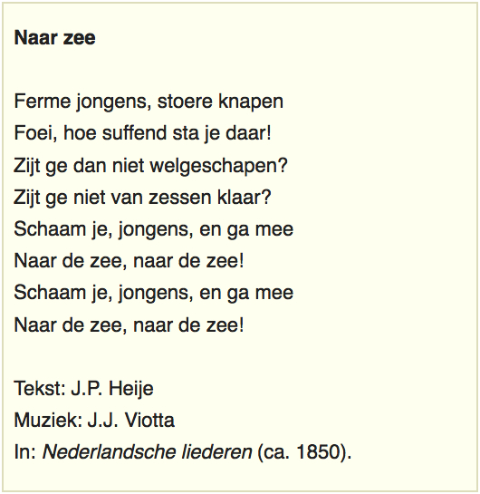 Jan Pieter Heije (1809-1876), kinderliedje 'Ferme jongens, stoere knapen', in: "Nederlandsche liederen" (ca. 1850).